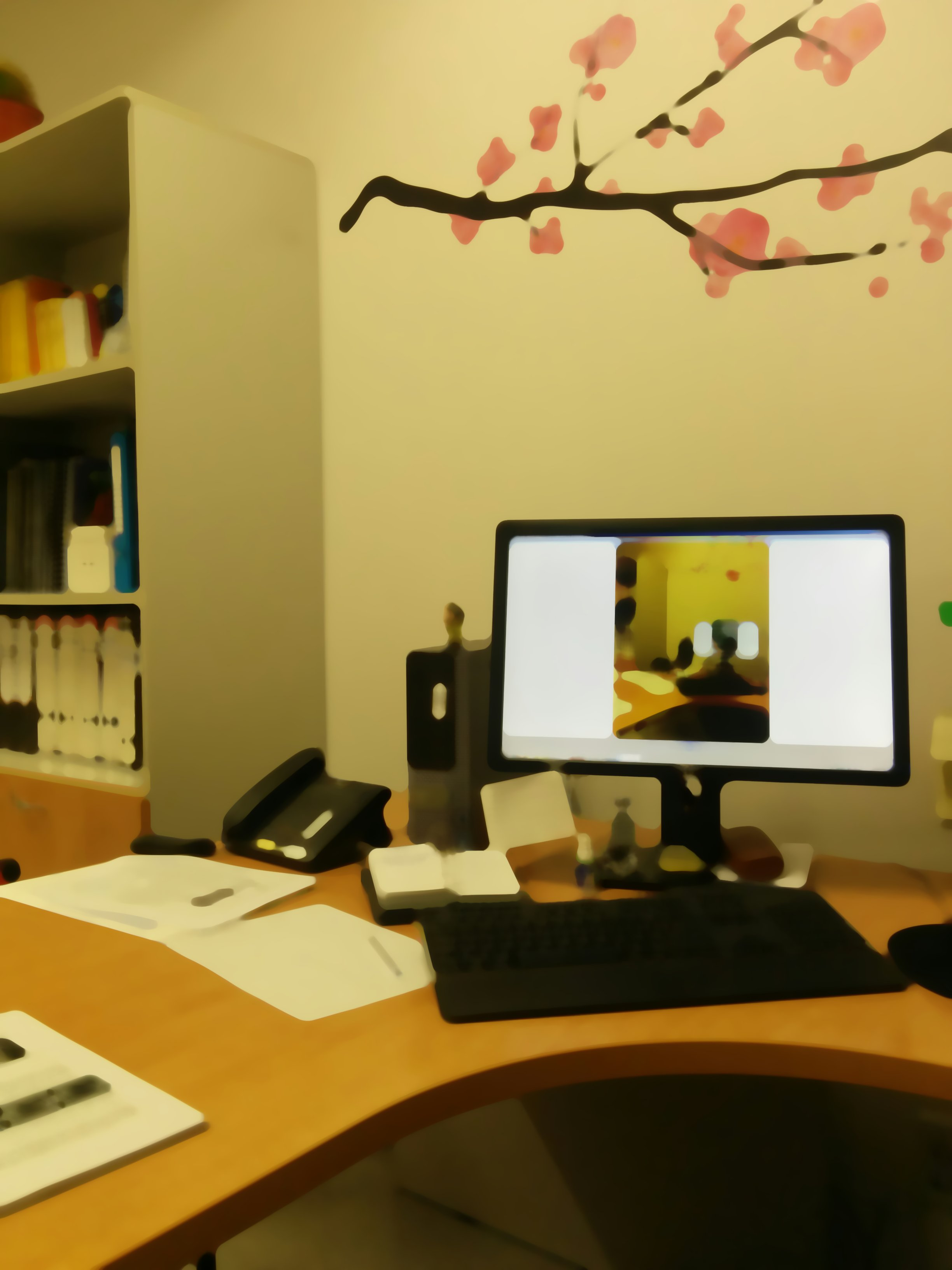 Imagen a la que se ha aplicado un filtro de mediana con radio = 20 píxeles